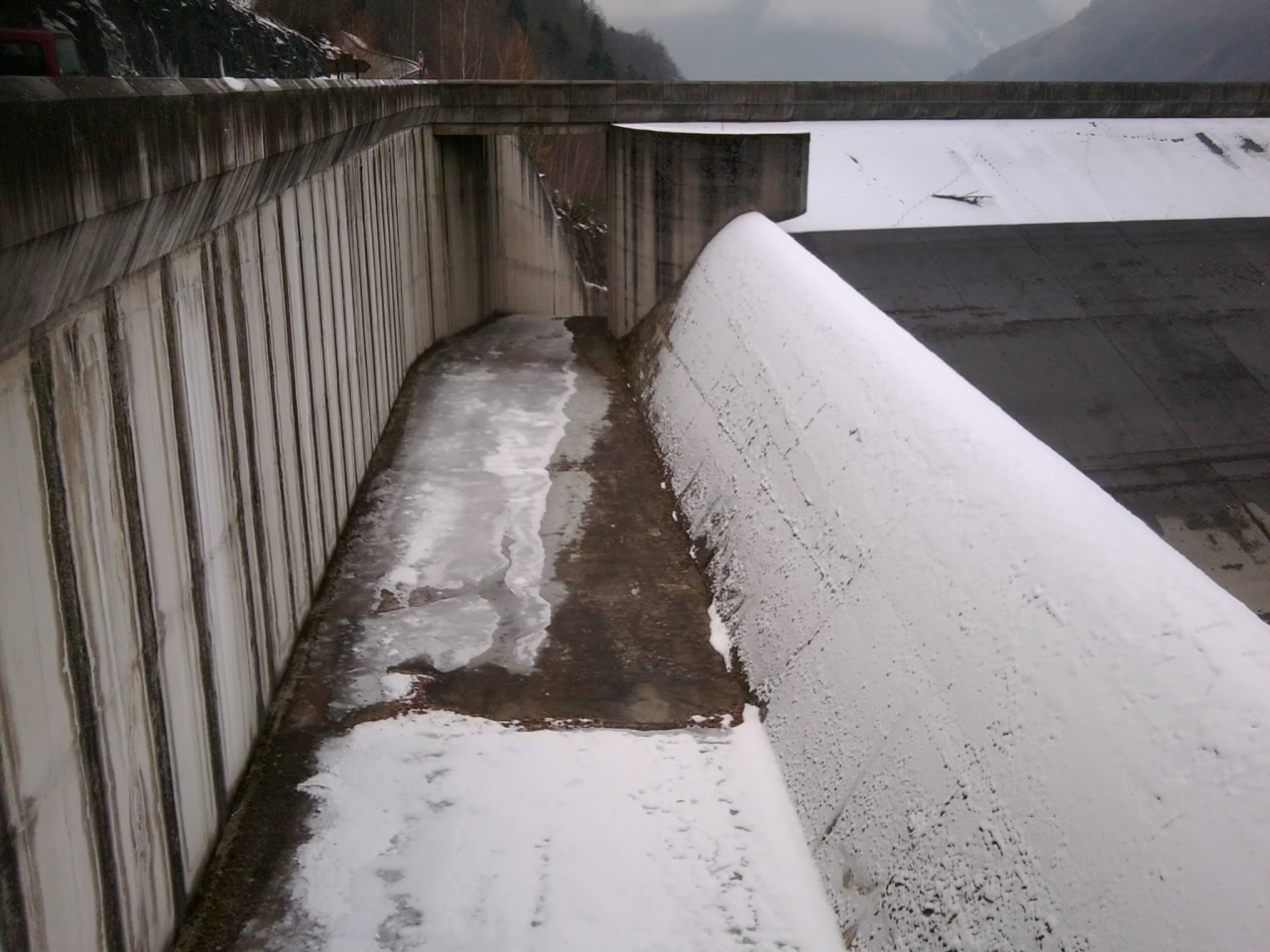 Barrage du Verney (38) : L'évacuateur de crues.